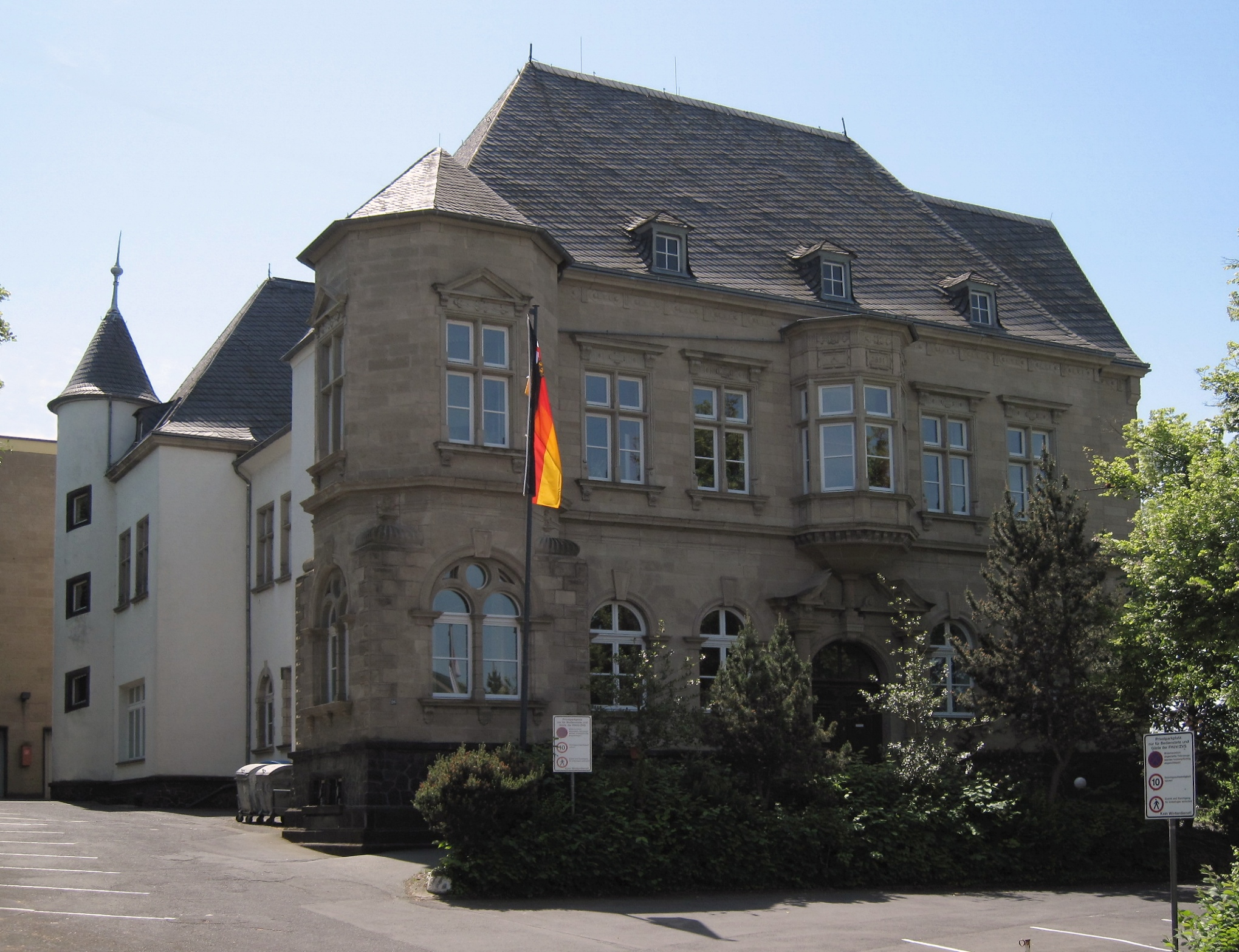 Fachhochschule für öffentliche Verwaltung, Zentrale Verwaltungsschule Rheinland-Pfalz in Mayen.